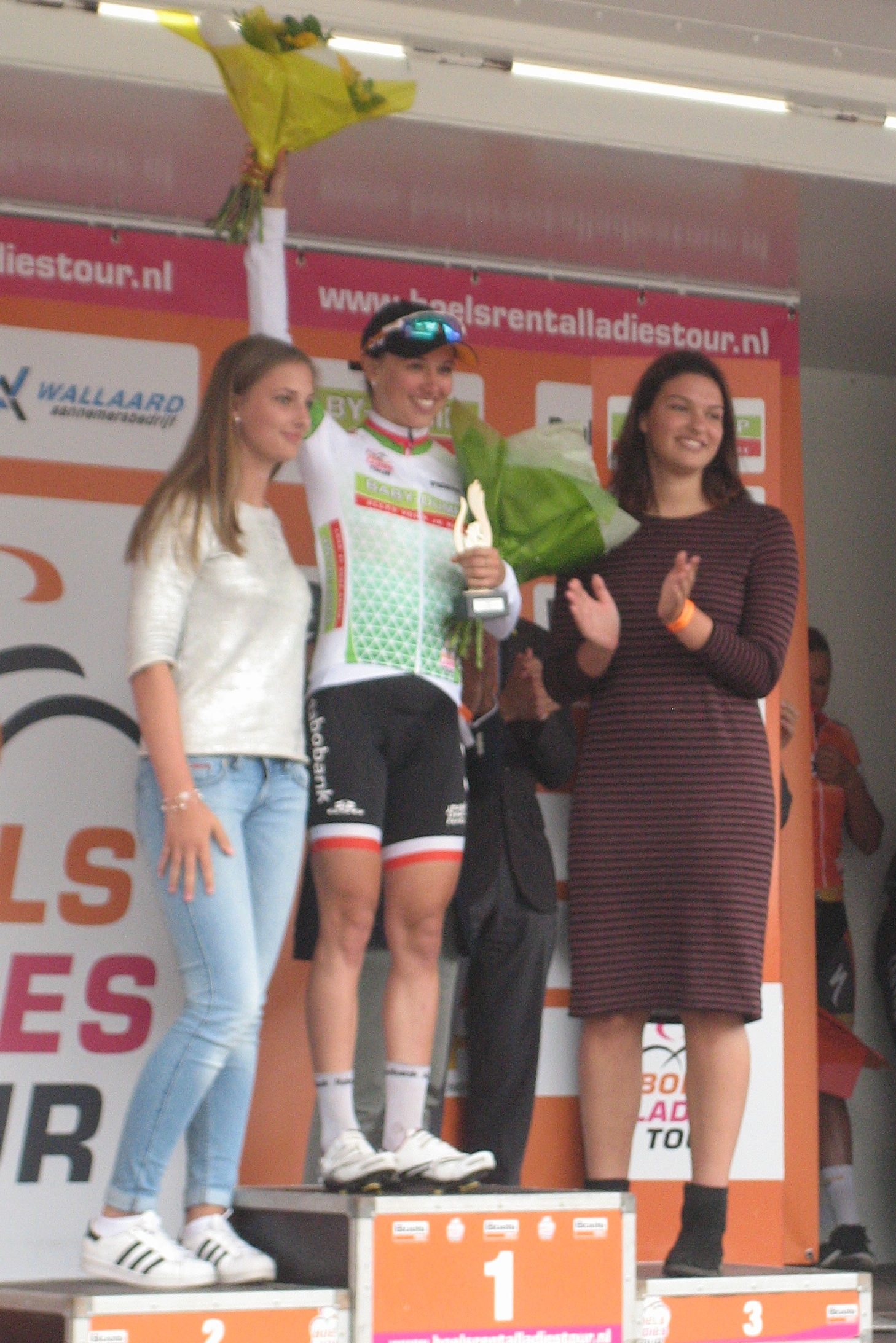 Katarzyna Niewiadoma, winnares van het puntenklassement van de Boels Ladies Tour 2016, op de Cauberg in Valkenburg, Limburg.